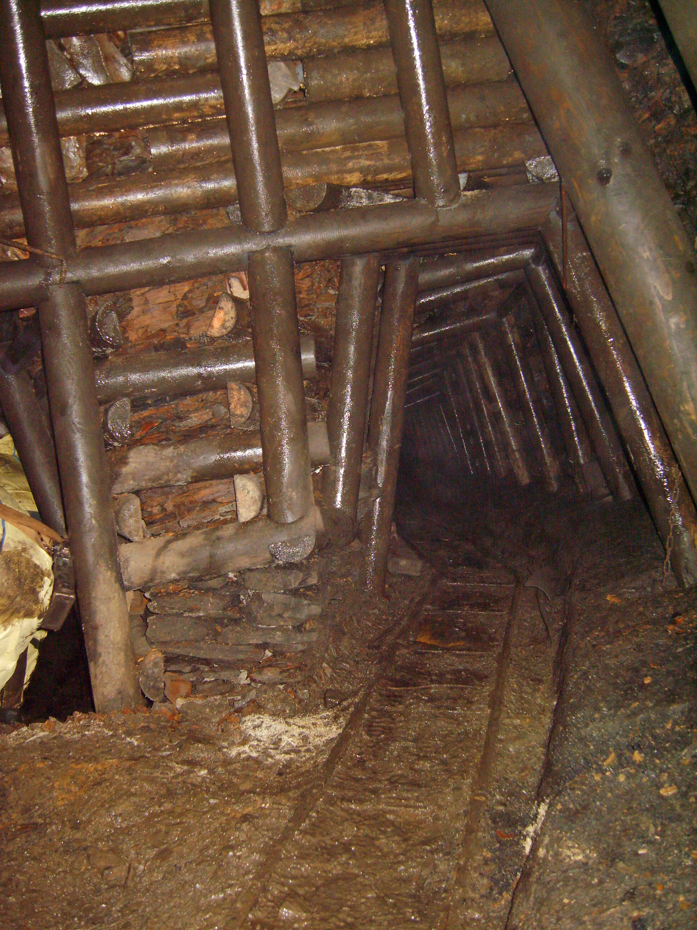 Im Besucherbergwerk Graf Wittekind